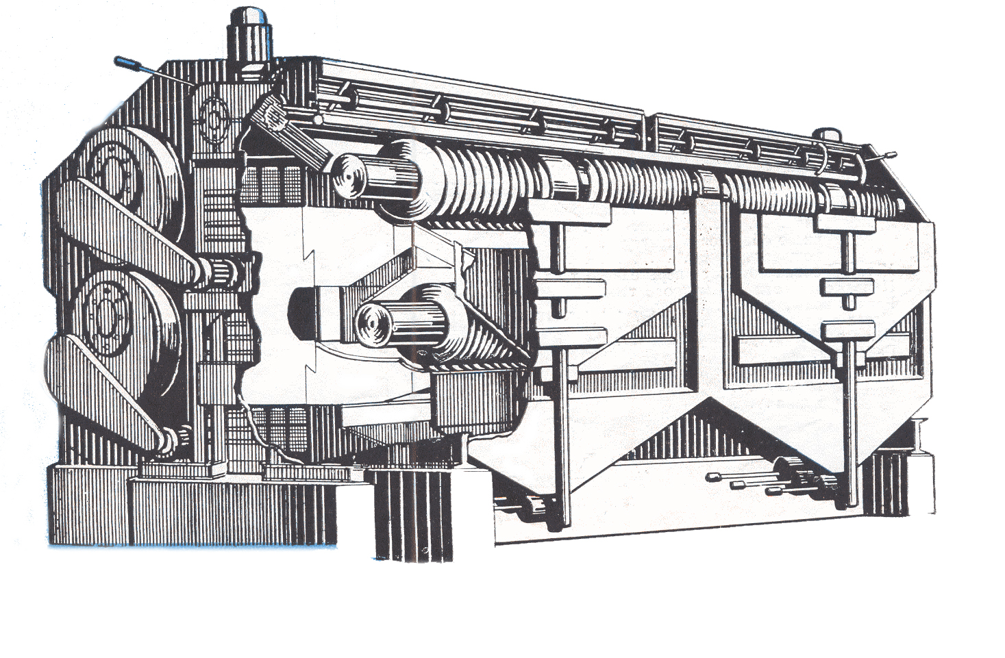 Рисунок